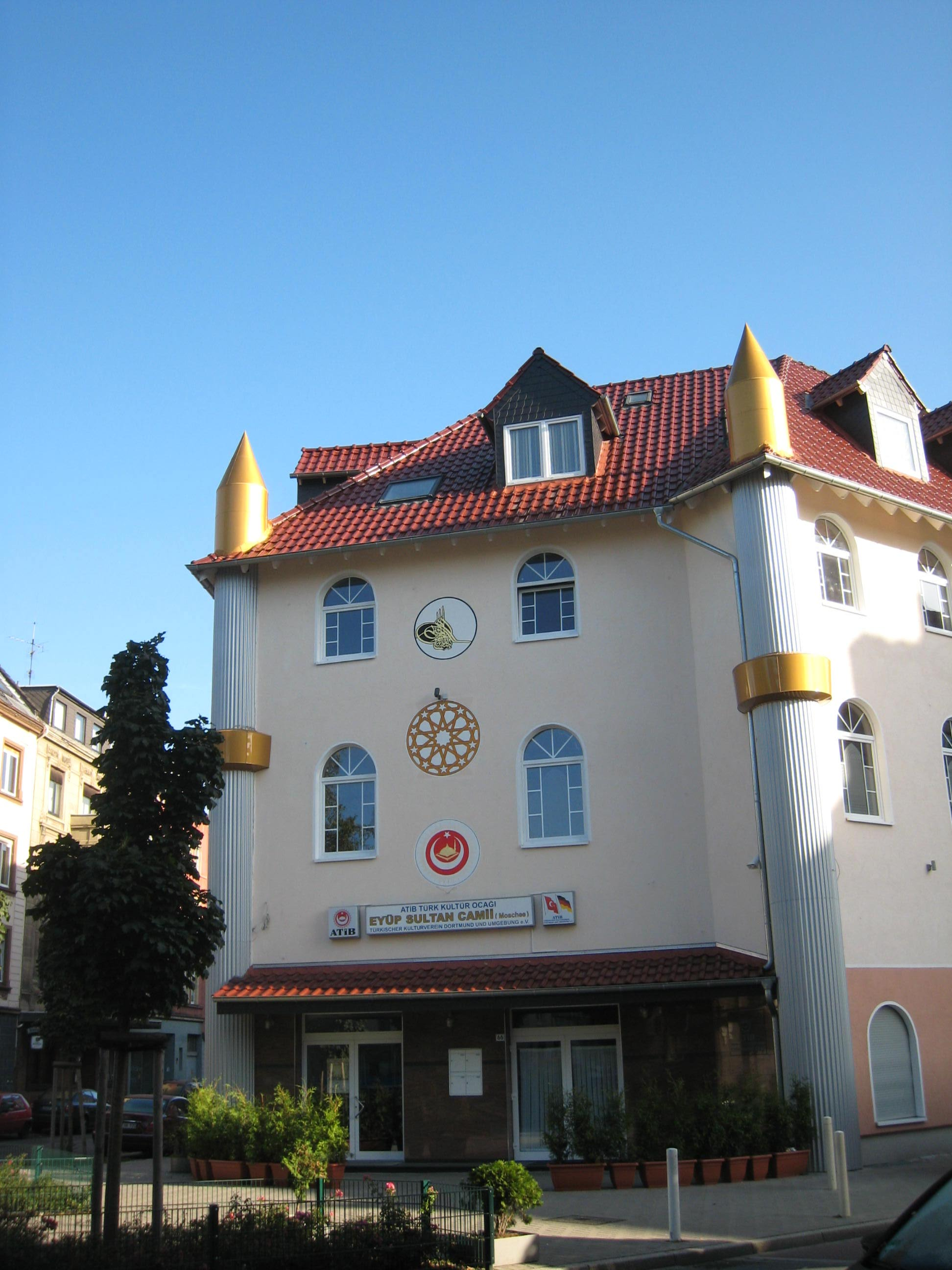 Etüp Sultan Moschee Dortmund